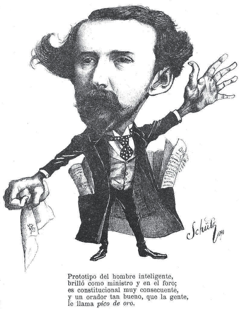 Caricatura de Juan Carlos Blanco por Schülz